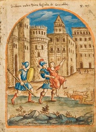 Shechem seizes Dinah